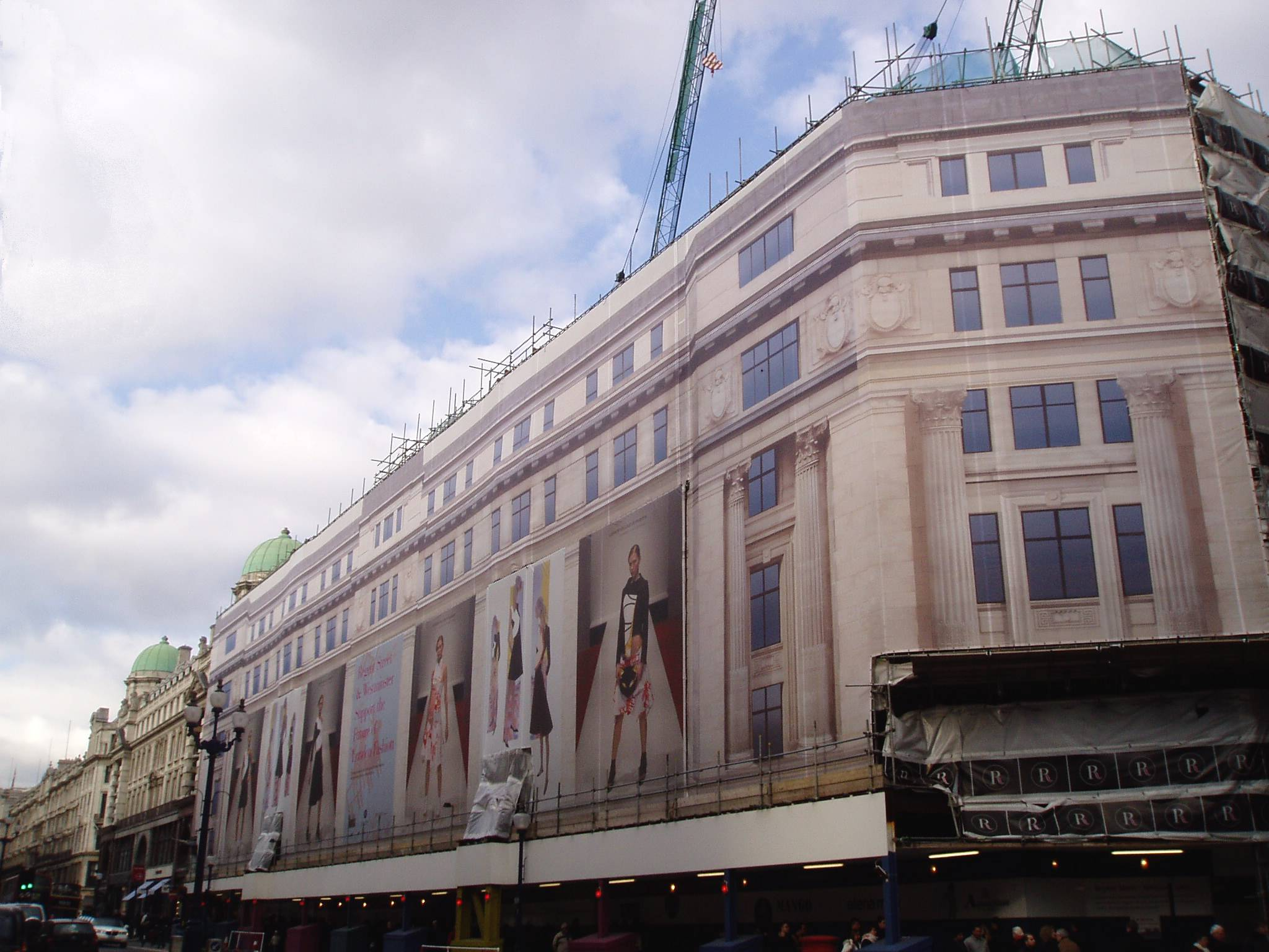 Regent Street.